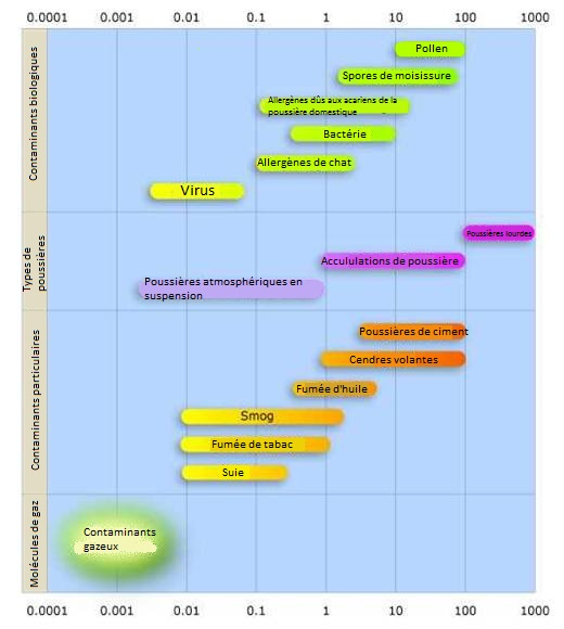 Schéma présentant différents contaminants atmosphériques en fonction de leur nature et de leur taille (en).